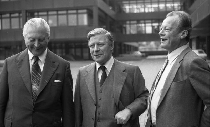 Pflanzung von Kanzler-Gedächtnisbäumen im Park des Palais Schaumburg durch Bundeskanzler Helmut Schmidt [mitte] und seine Vorgänger Willy Brandt [rechts] und Kurt-Georg Kiesinger [links]